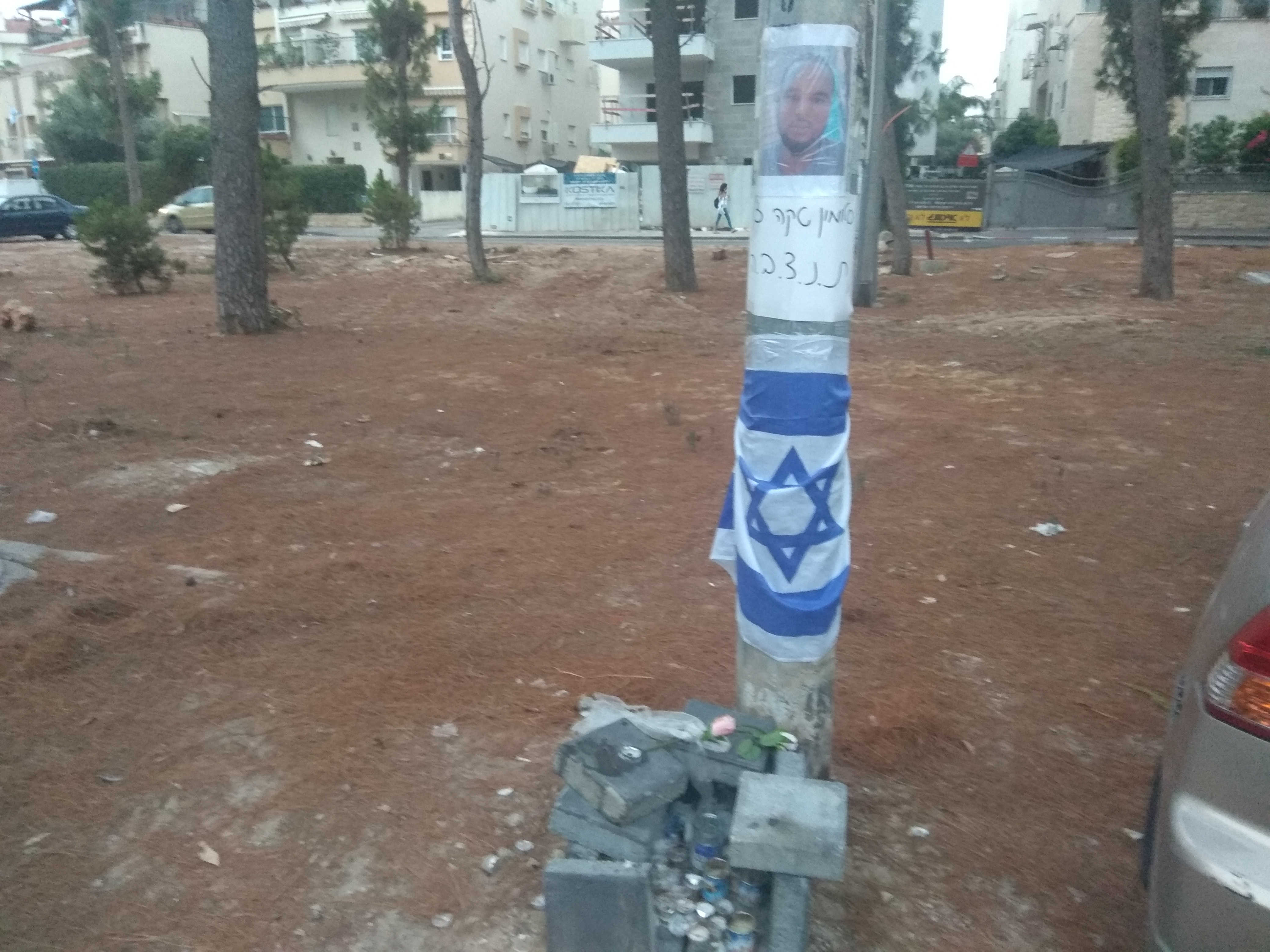 מקום האירוע